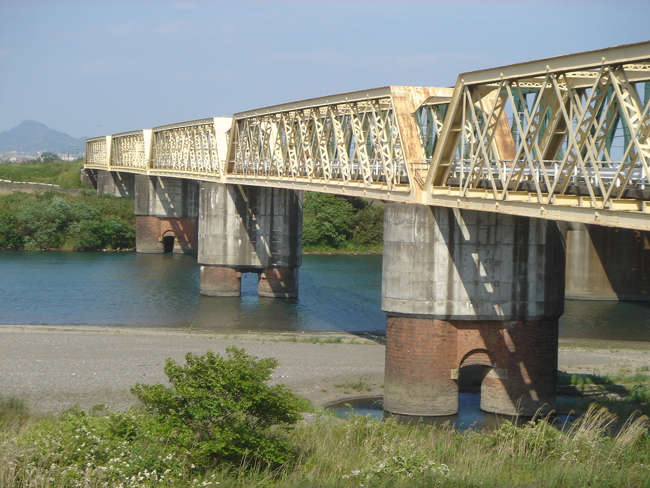 Ibigawabashi(揖斐川橋),Ogaki,Gifu,Japan(岐阜県大垣市)で撮影